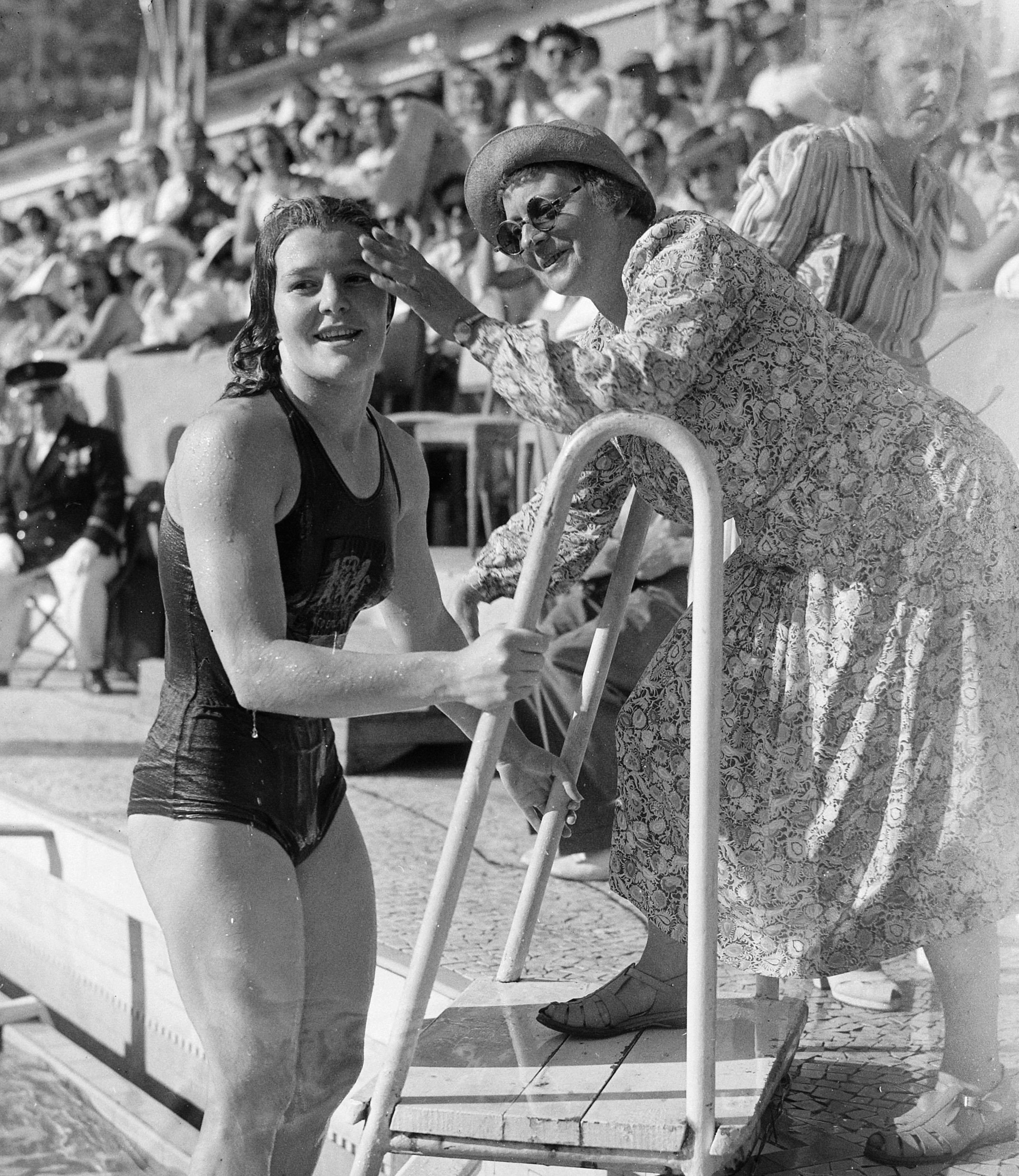 Europese zwemkampioenschappen te Monaco. Nel van Vliet komt uit het water. Geheel rechts trainster "Ma" Braun.